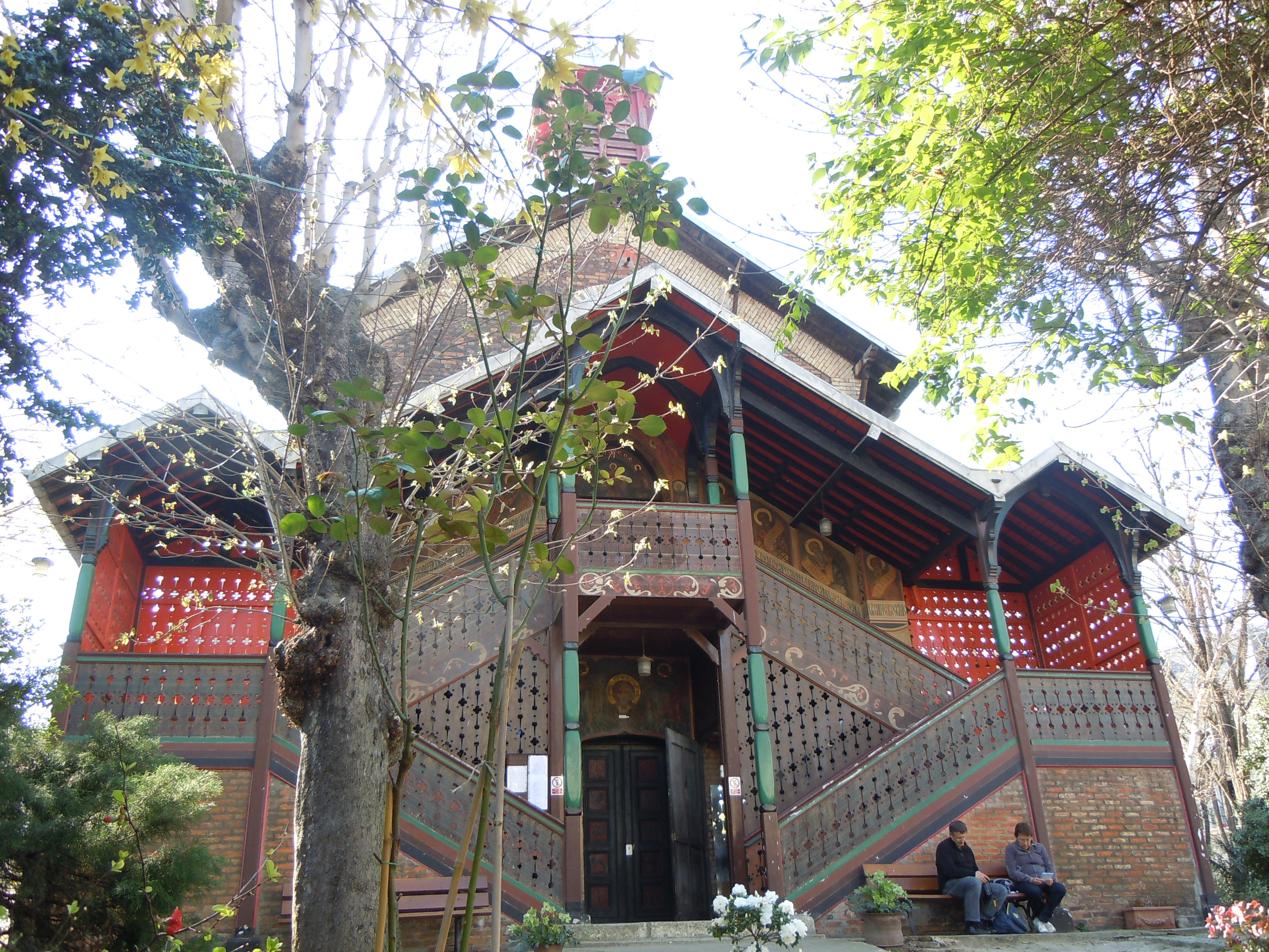 Façade de l'Église Saint-Serge